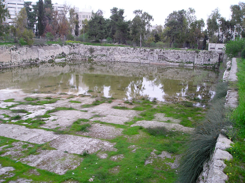 Sadzawka Mamilla w Jerozolimie w Izraelu. Foto Sesek, 2005.